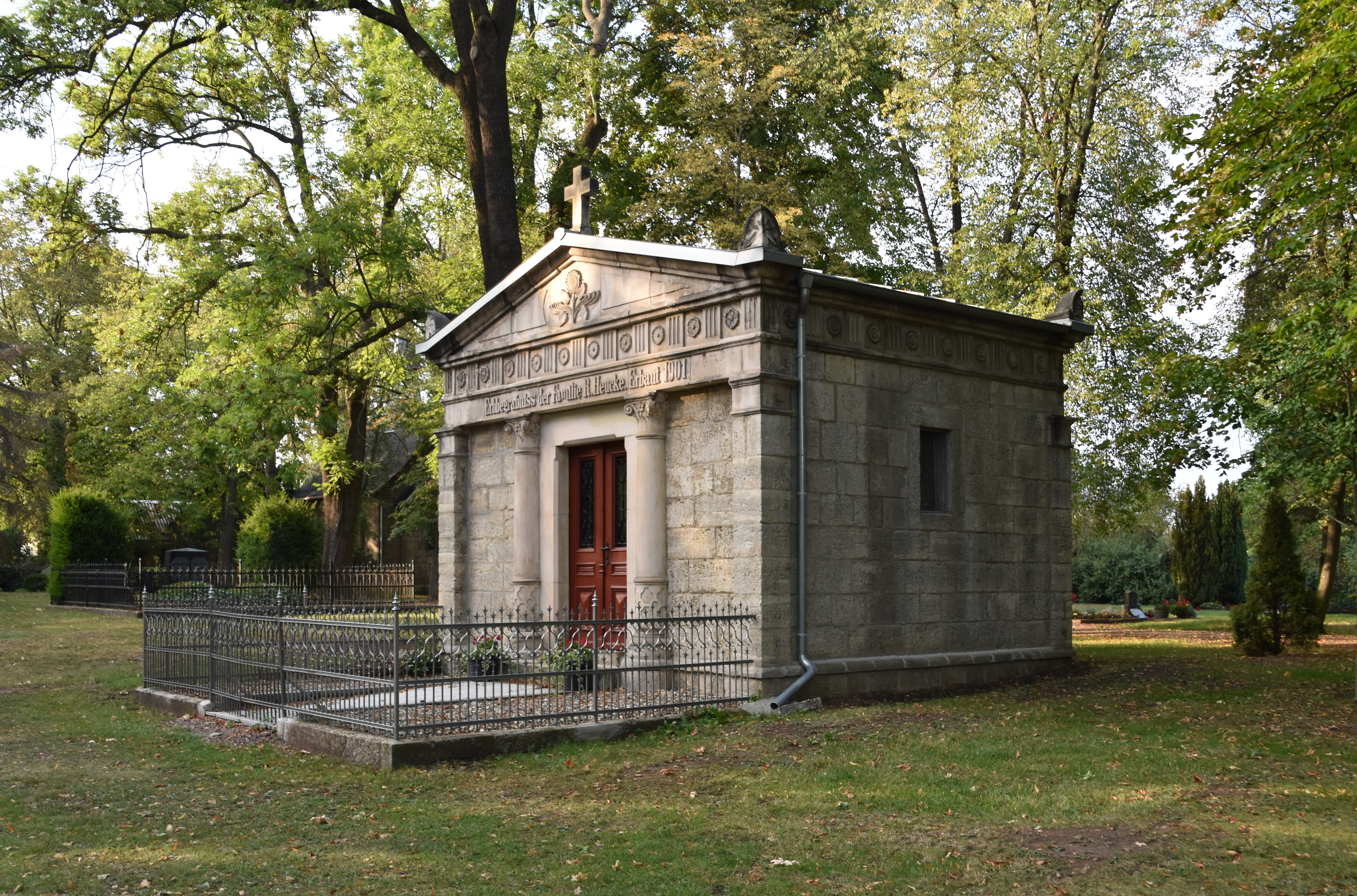 Erbbegräbnis R. Heucke auf dem Friedhof Hausneindorf